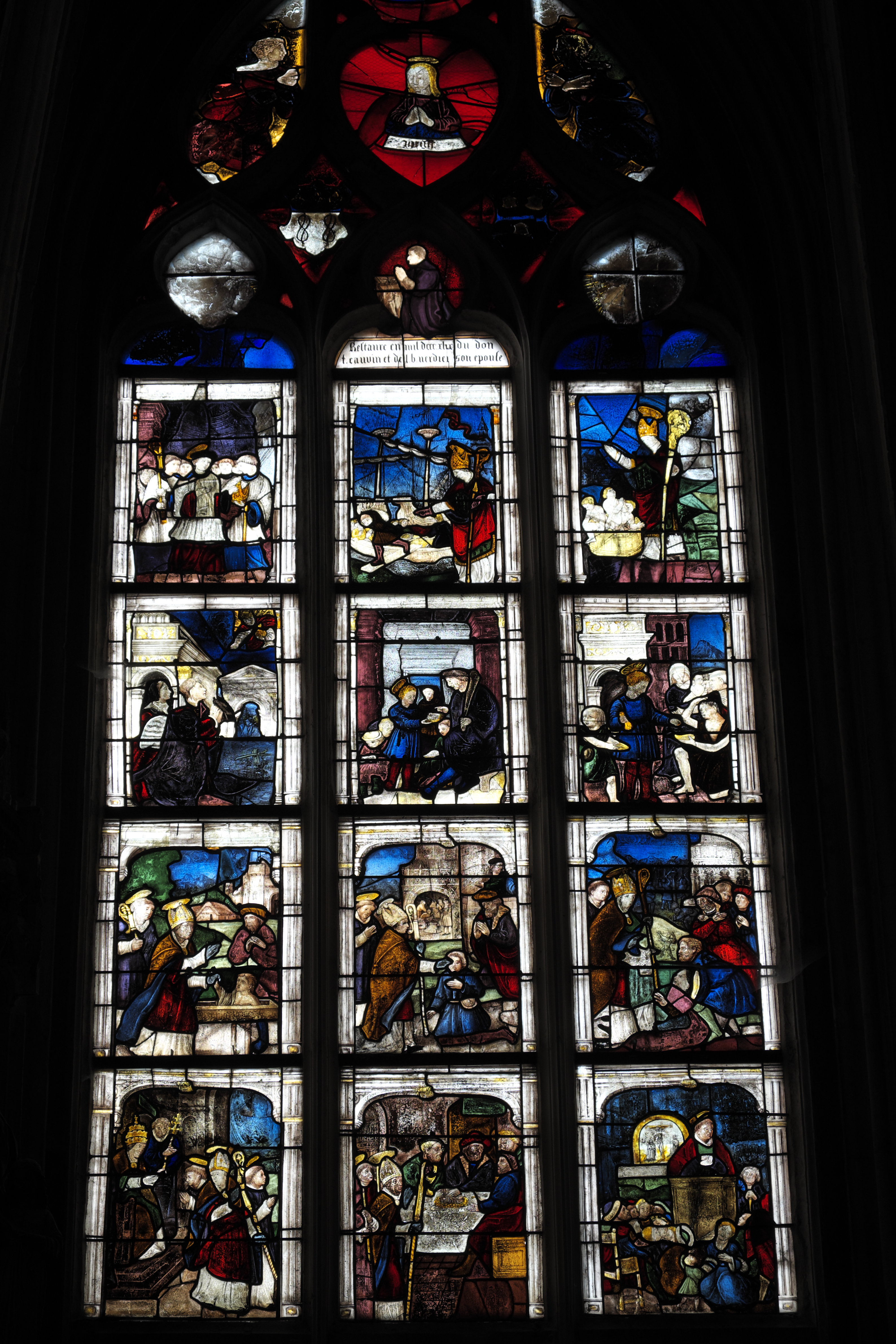 Katholische Pfarrkirche Notre-Dame-des-Marais in La Ferté-Bernard im Département Sarthe (Pays de la Loire/Frankreich), Bleiglasfenster (baie 12), aus der ersten Hälfte des 16. Jahrhunderts, von François Delalande; 1849 restauriert; Darstellung: Szenen der Legende des hl. Julien und des hl. Nikolaus